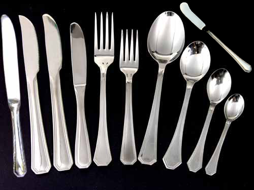 linea de cubiertos completa de calidad pulido espejo LYPSA